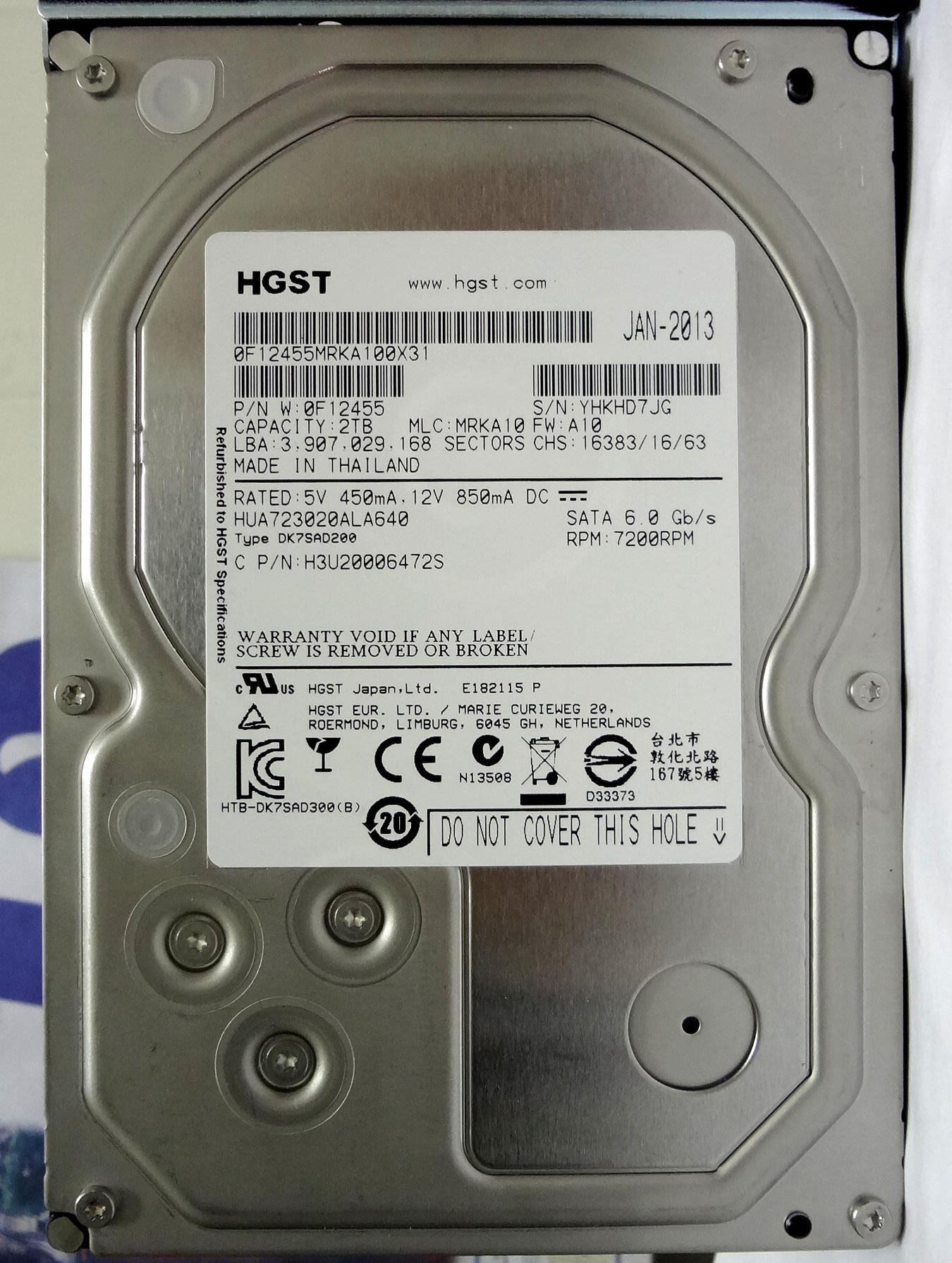 HGST於2013年1月製造的Ultrastar硬碟機HUA723020ALA640。